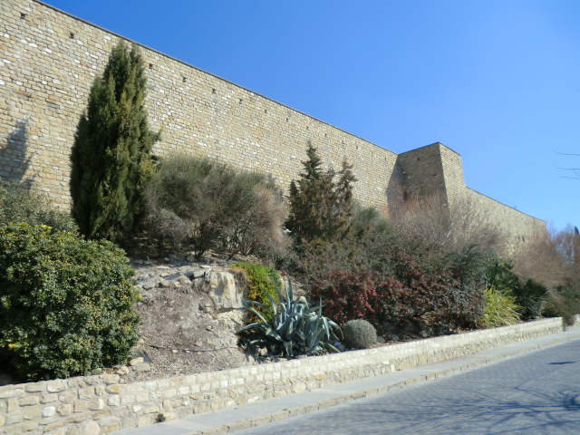 Murallas de Úbeda (Jaén)